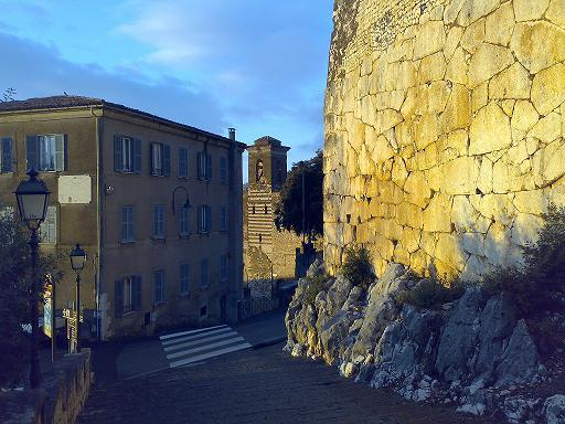 Alessandro P.,opera propria,Mura ciclpoiche e chiesa di S. Oliva,pubblico dominio,scatta il 17.01.2008